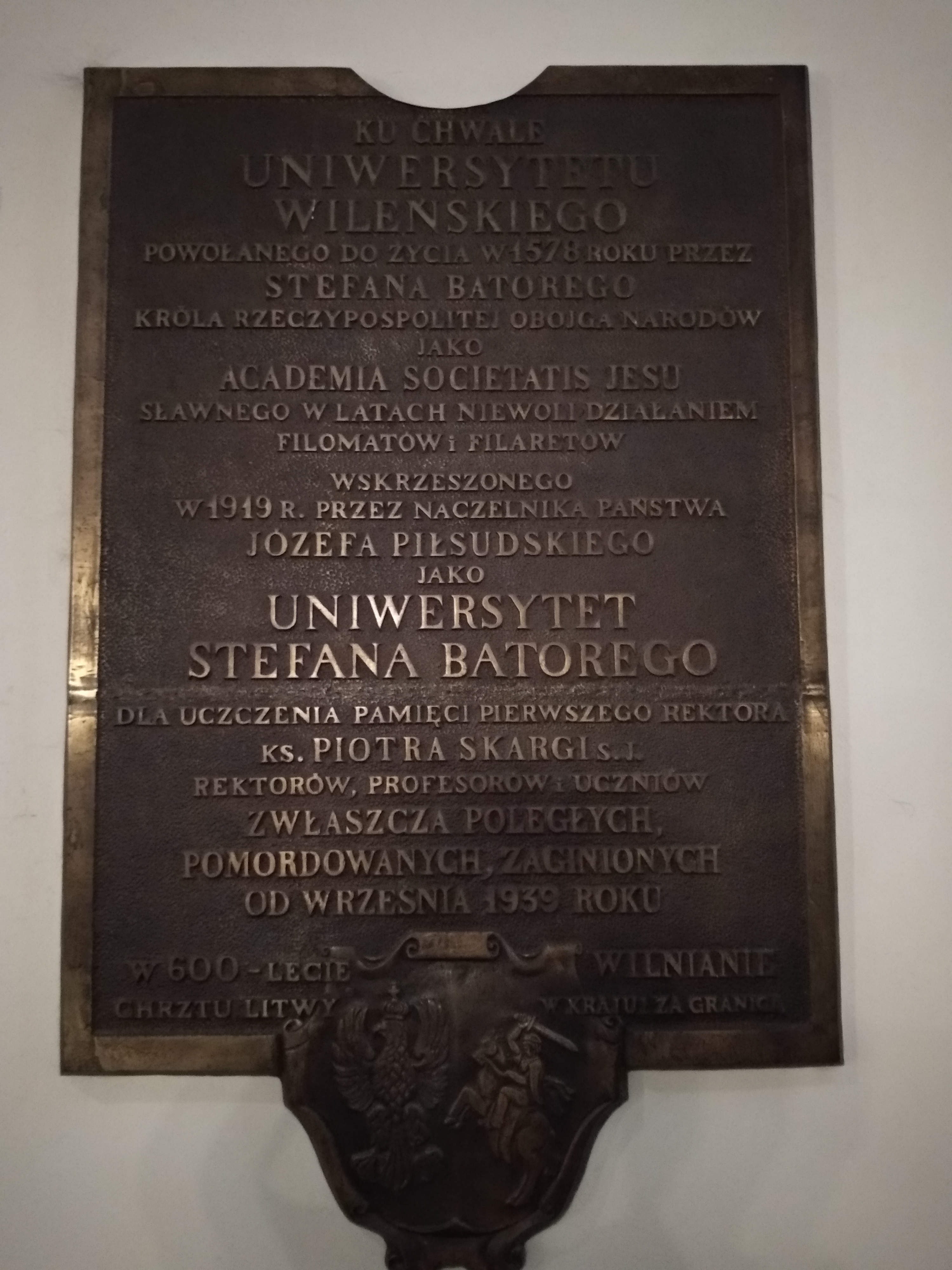 Tablica upamiętniająca Uniwersytet Wileński w Bazylice archikatedralnej św. Jana Chrzciciela w Warszawie.